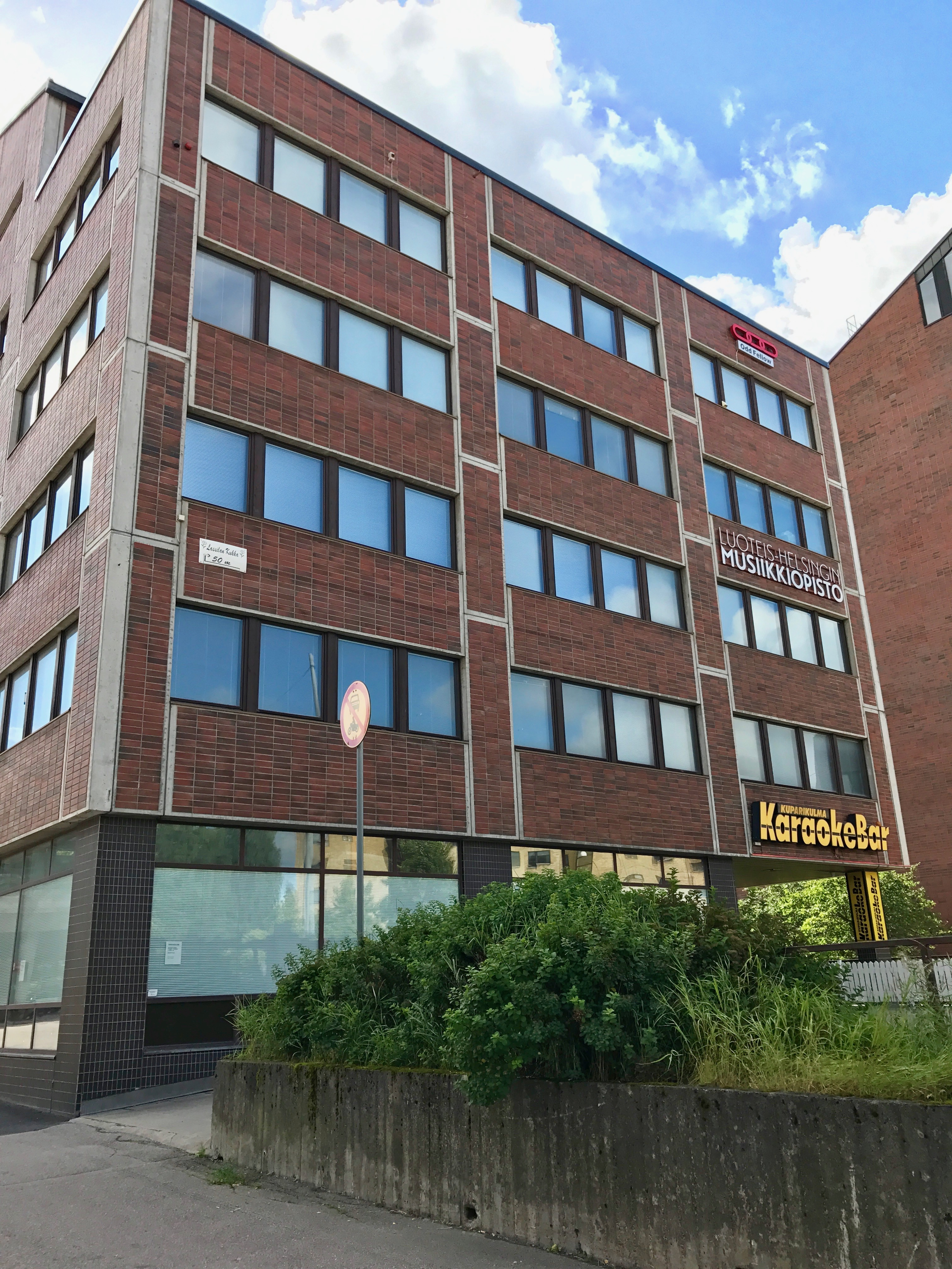 Luoteis-Helsingin musiikkiopisto Pohjois-Haagassa